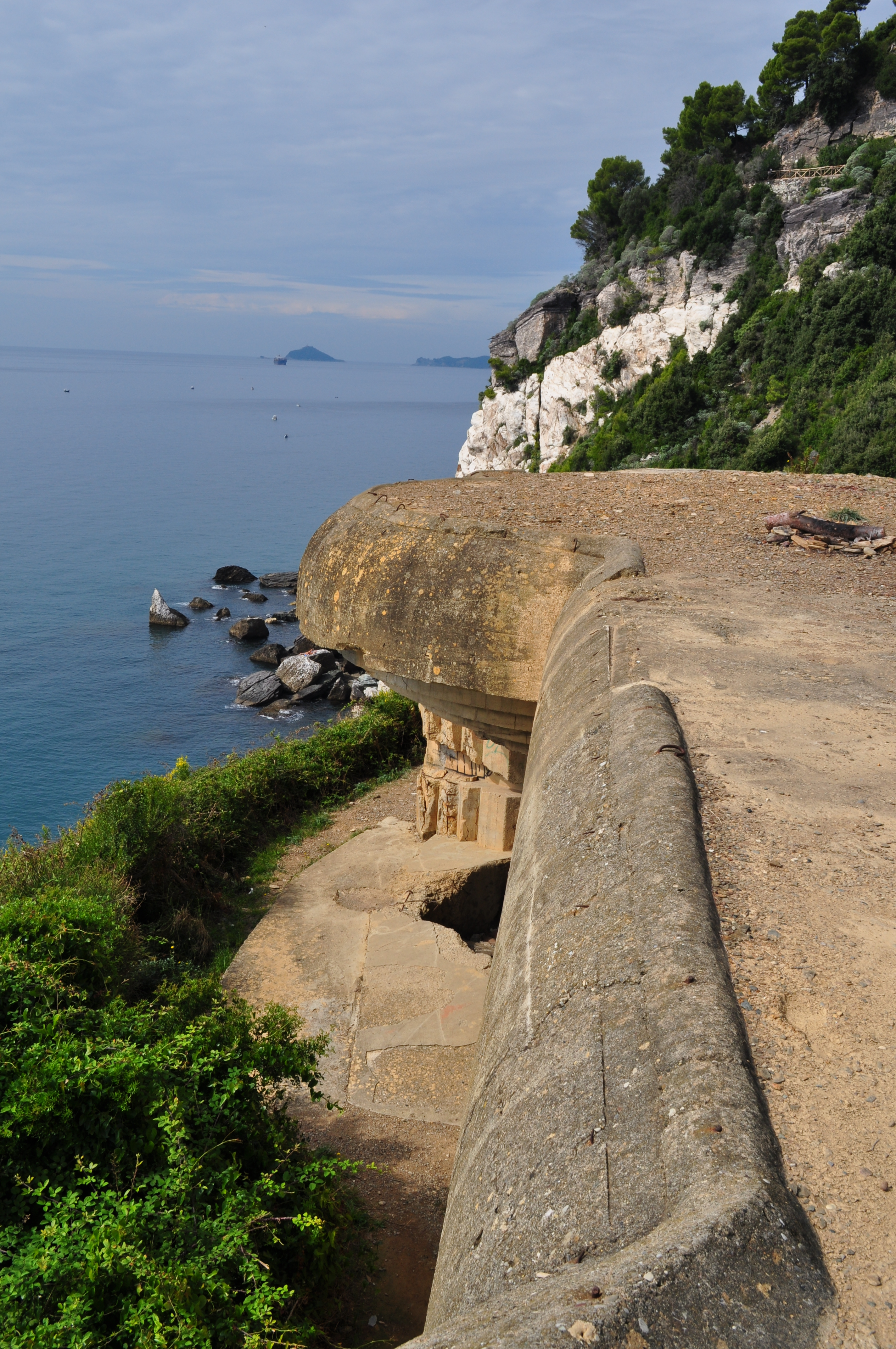 Postazioni da 155 della batteria Dante De Lutti, Montemarcello, La Spezia